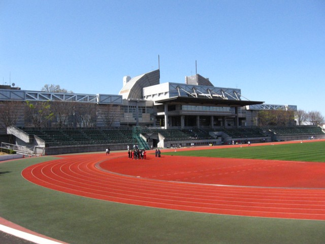 武蔵野市総合体育館